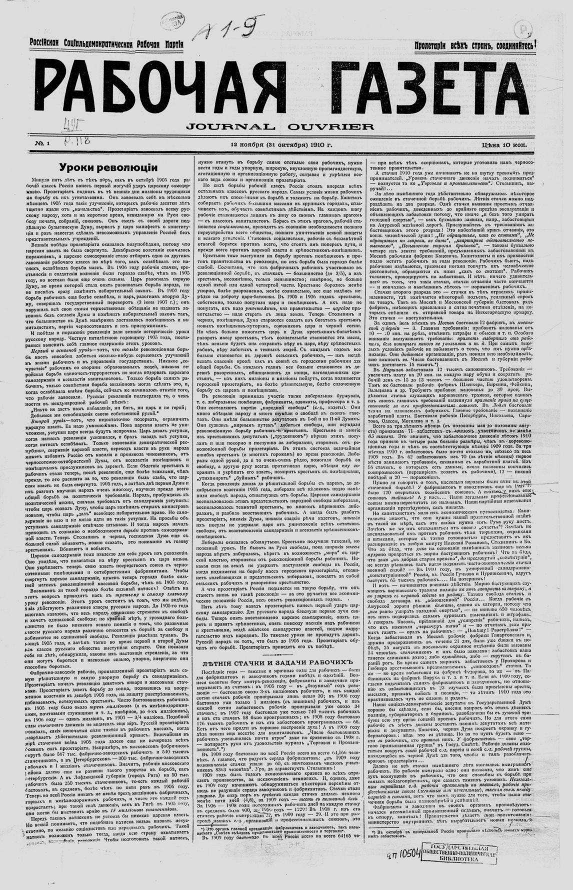 Рабочая газета = Journal ouvrier : орган ЦК Российской социал-демократической рабочей партии / ред. В. Ульянов (Ленин).- Париж, 1910-1912